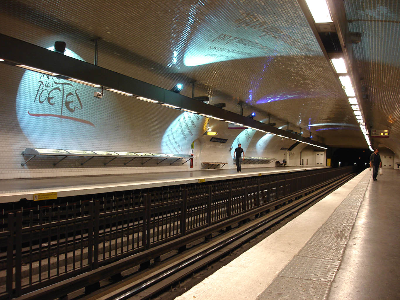 Station Saint-Germain-des-Prés, de la ligne 4 du métro de Paris, France.